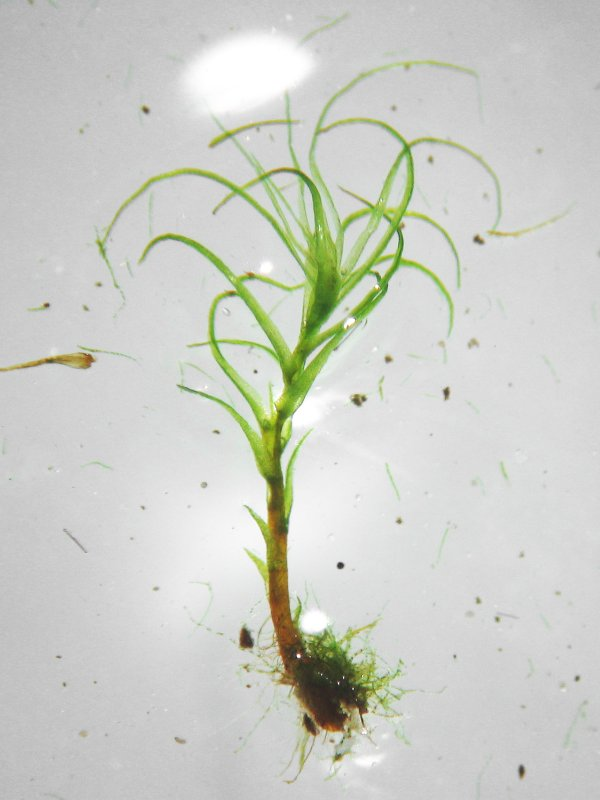 Einseitswendiges Kleingabelzahnmoos Dicranella heteromalla, Habitus